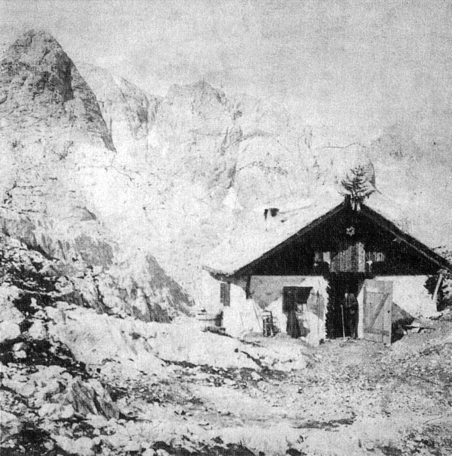 Fotografie der eben fertiggestellten ersten Simonyhütte von Friedrich Simony